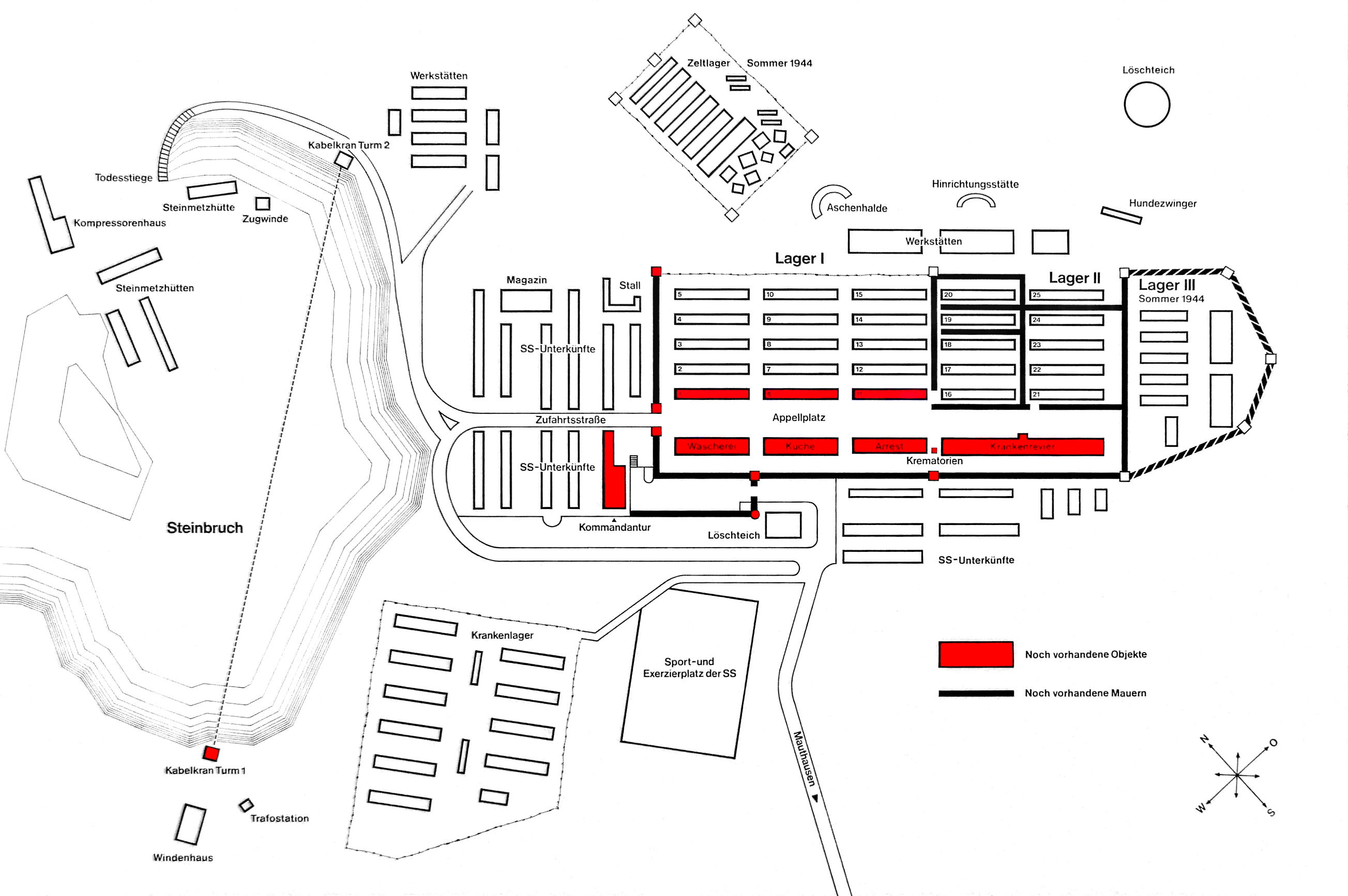 Mauthausen: Plan des Lagers aufgenommen am 28.Mai 2010